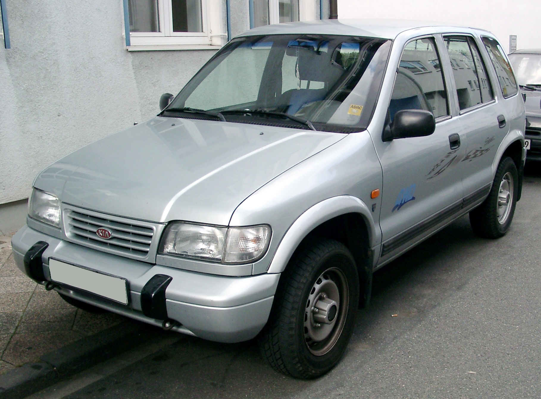 Kia Sportage, 1. Generation